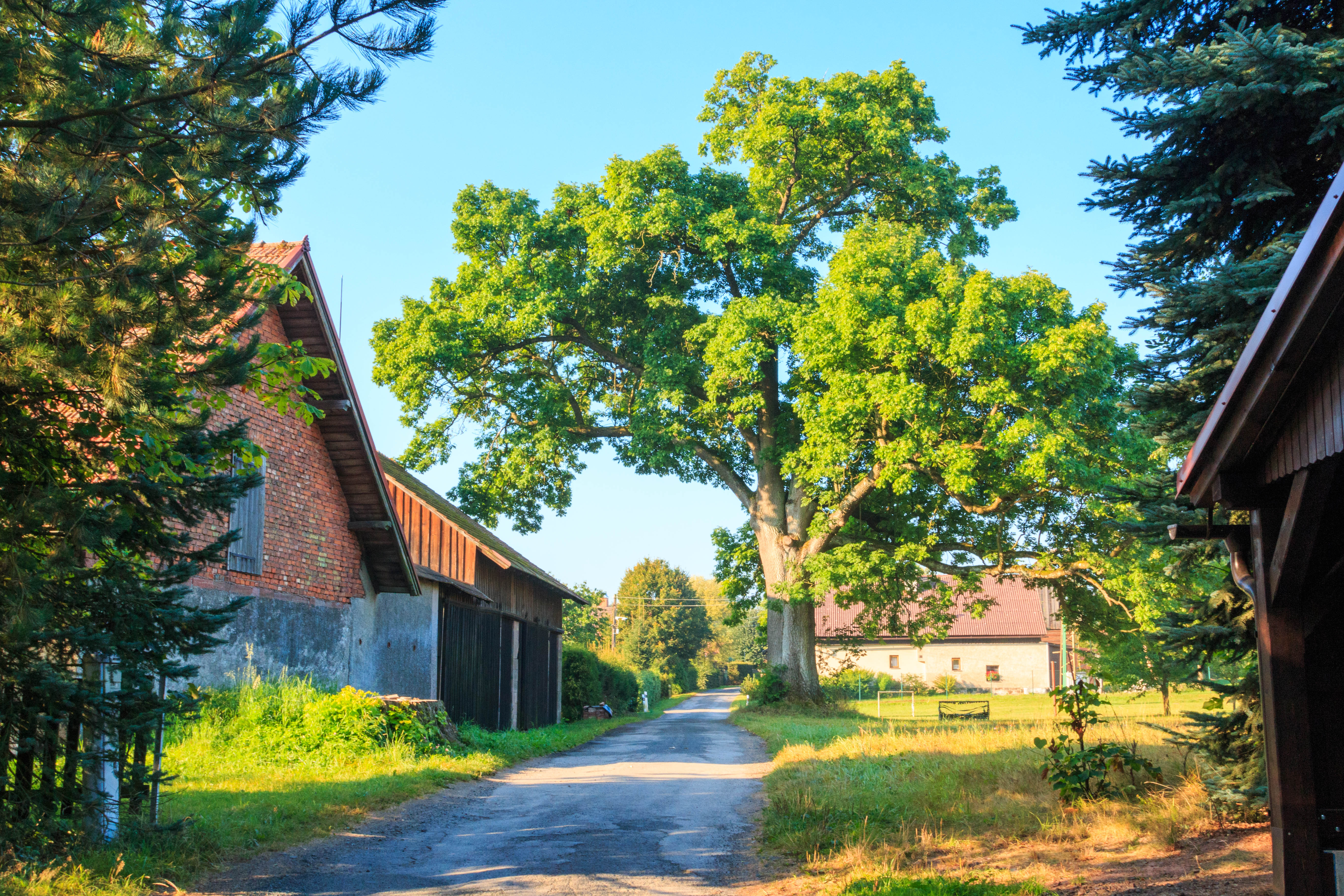 Nové Dvory u Lomnice nad Popelkou - jasan